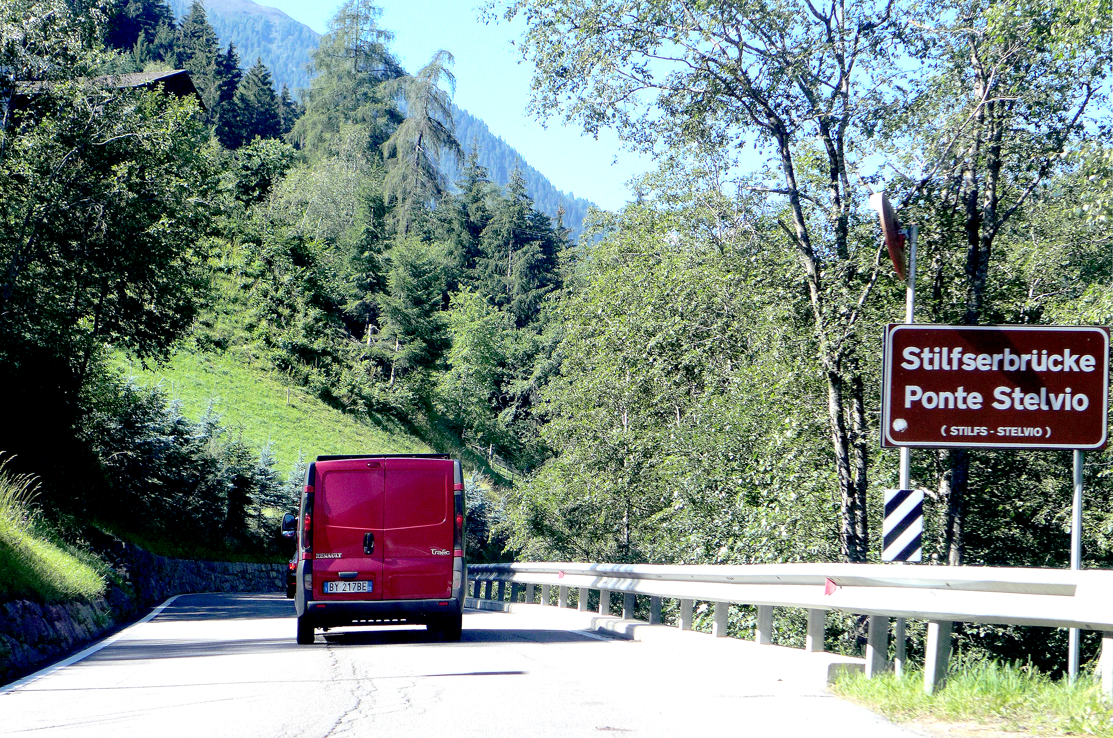 Ponte Stelvio/Stilfserbrücke, a Stelvio-hágó útjának kezdete Olaszországban